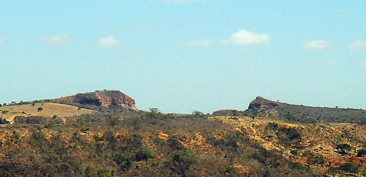 Montes do Boqueirão.